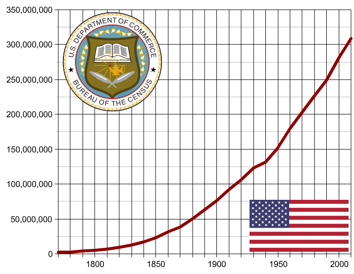 Bevoelkerungsentwicklung in den Vereinigten Staaten zwischen 1770 und 2010 basierend auf Daten des US Department of Commerce, Bureau of the Census; Fehler von verbessert, beinhaltet und Bitte bei weiterer Verwendung die Bedingungen des Siegels des US Department of Commerce, Bureau of Census beachten.